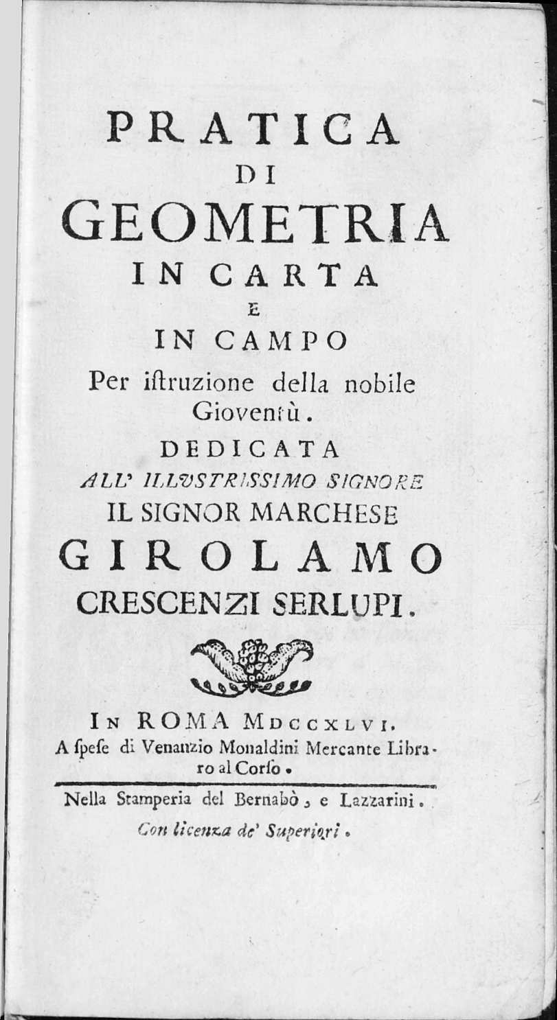 Frontespizio